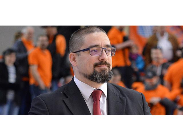 Jesús Sala entrenador de baloncesto